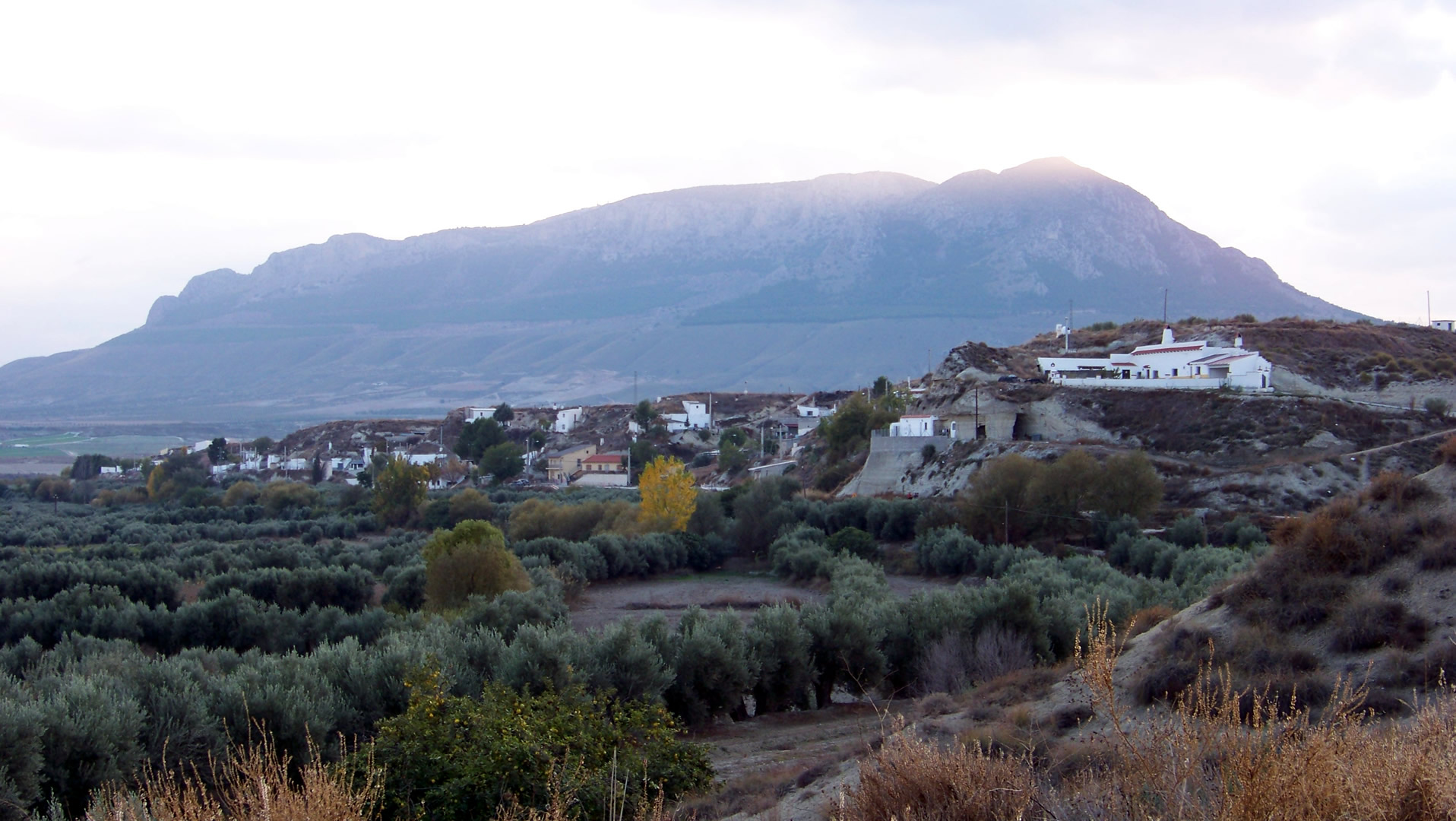 Panorámica de la localidad de Huerta Real con el cerro Jabalcón al fondo.